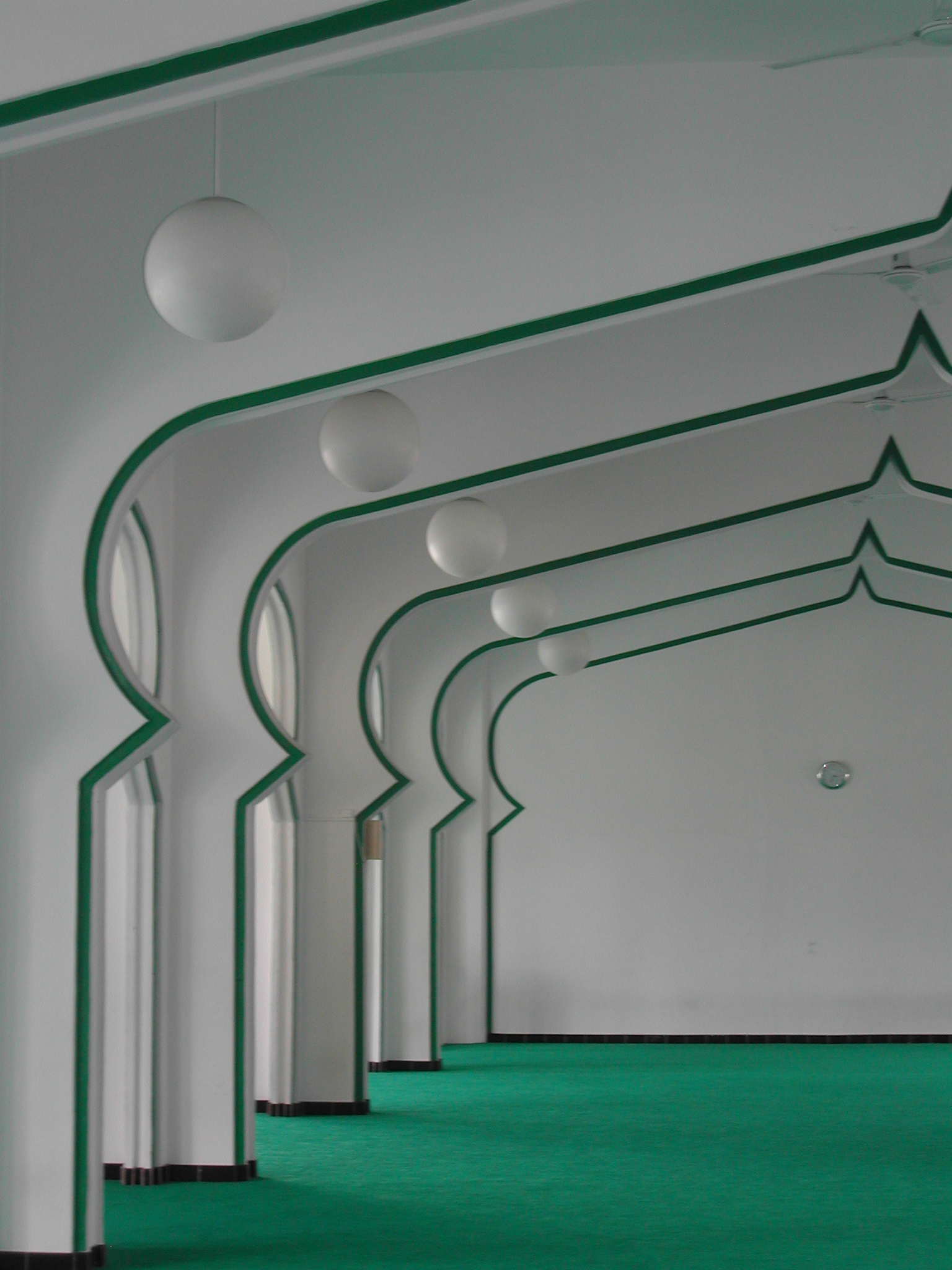 Photo de la salle de prière de la mosquée Noor-al-Islam à Saint-Denis de la Réunion.